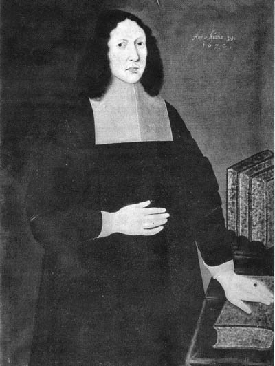 Oljemålning i Lunds universitetsbibliotek.